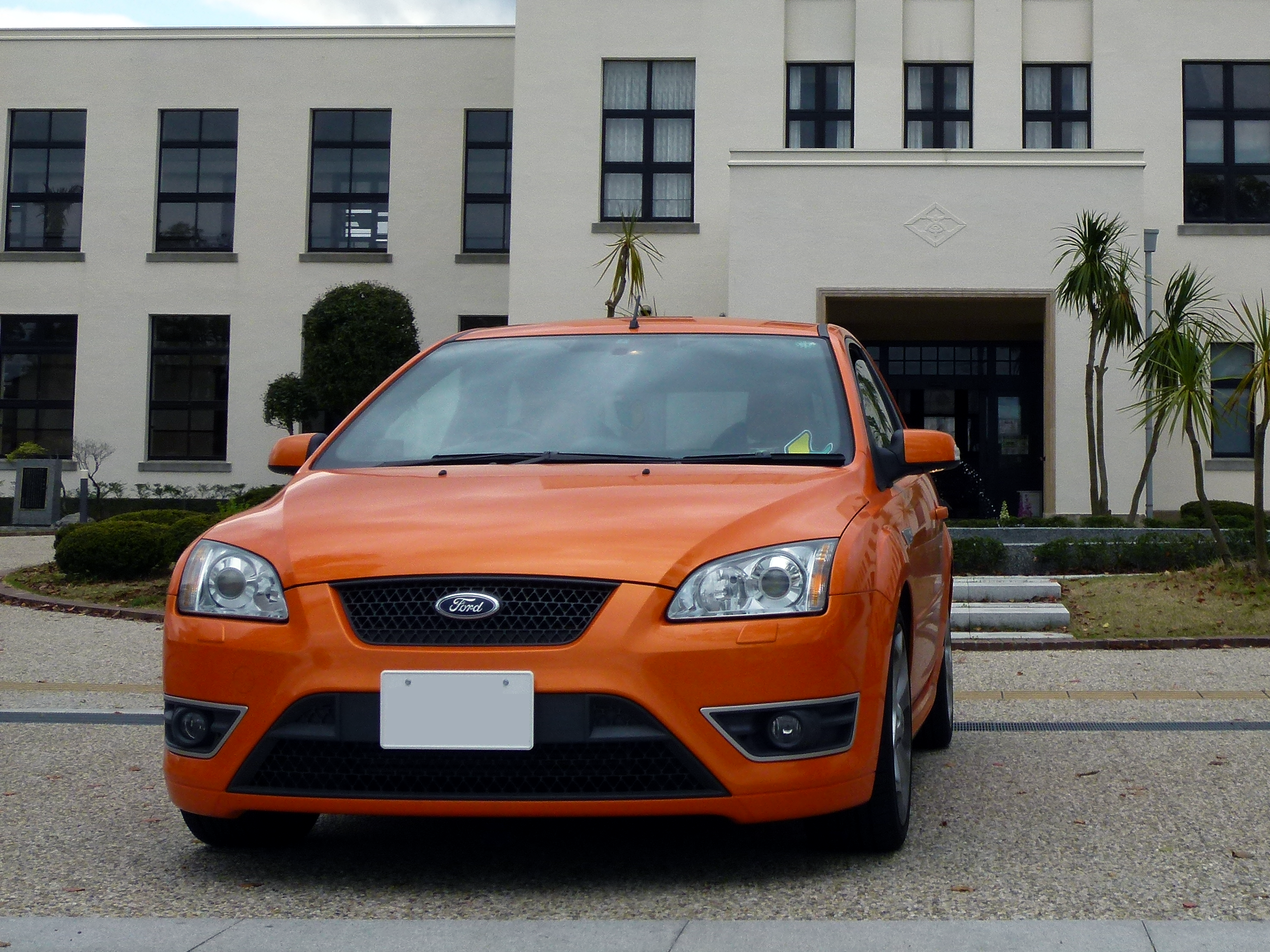 撮影場所:滋賀県 旧豊郷小学校校舎前